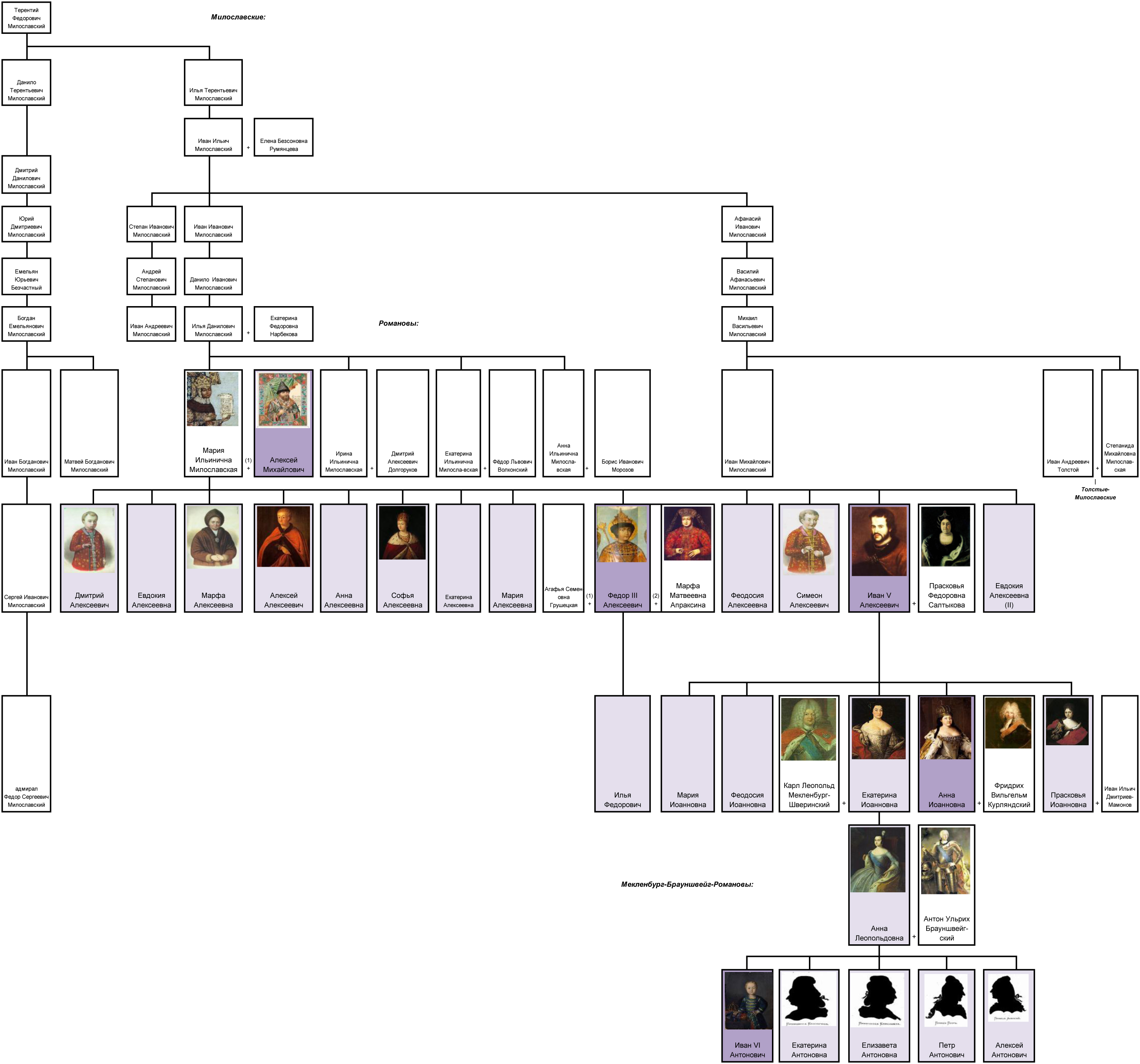 Генеалогическое древо дома Романовых и его взаимосвязи с семьей бояр Милославских: родственники и потомки царицы Марии Милославской.